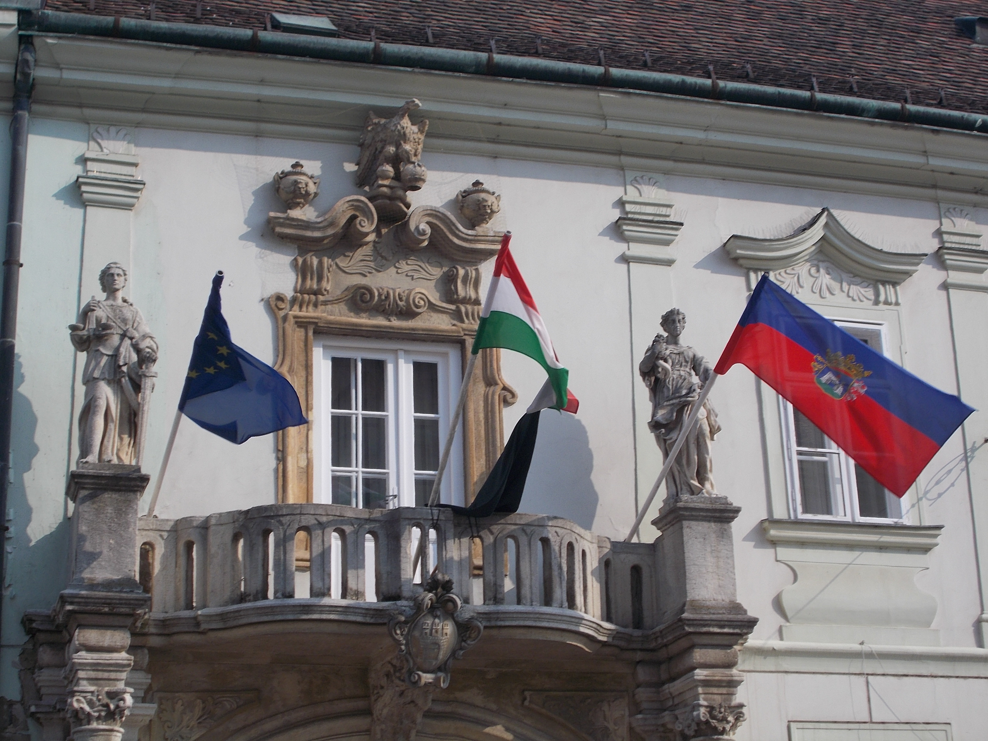 Városháza erkélyes, oszlopos díszes kapuja. Műemlék ház ID 3915. Az erkély mellvédje hullámtagos, a konzoltag felett városcímerrel. Allegorikus épületszobrai - Justitia és Prudentia. Avagy: Igazság és Okosság (Az alkotás a Városháza erkélyének bal illetve jobb oldalán található.). Szakál Ernő, 1960. Utobbi készítője: Thomas Walch (kőfaragó), 1718. Az erkélynyílás füles keretezésű, volutatagos, kőkeretes, egyenes záródású, törtívű szemöldökpárkányán koronát és kardot tartó sas látható a szélein vázákkal- Fejér megye, Székesfehérvár, , Belváros, Városház tér 1., Kossuth u. 1. This is a photo of a monument in Hungary. Identifier: 3915